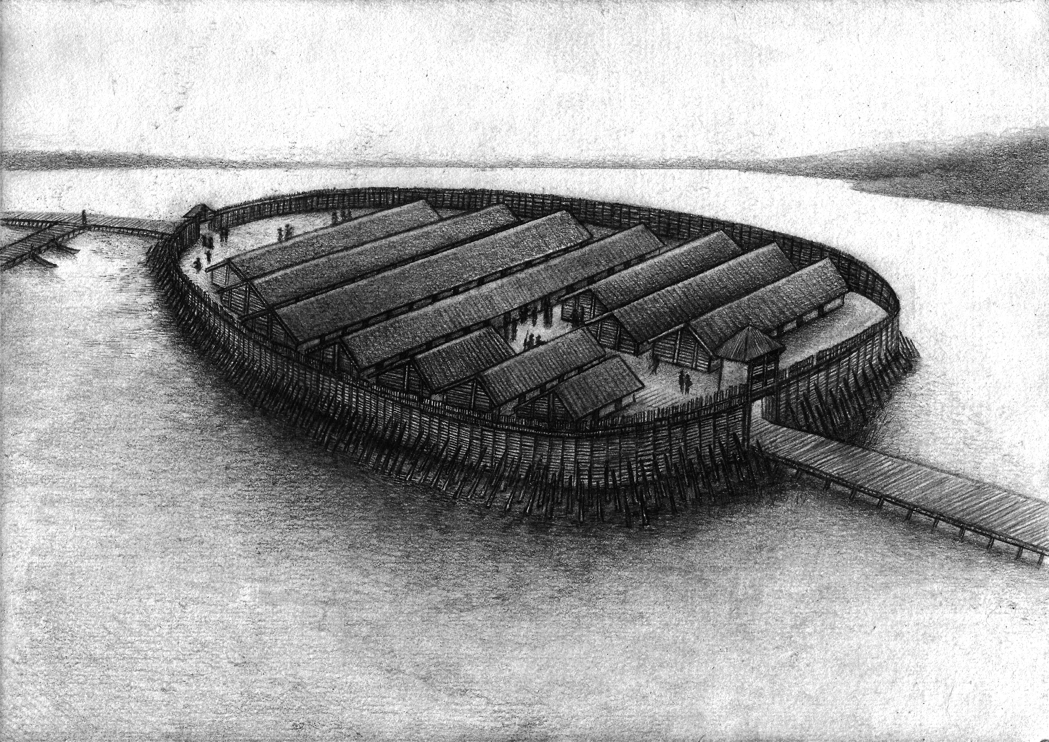 Rysunek przedstawia artystyczną wizję grodu kultury łużyckiej w Smuszewie. Z uwagi na to, że nie przeprowadzono dokładnych badań całego grodziska wygląd bramy, lokalizację pomostów oraz majdanu należy uznać co najwyżej za możliwą.